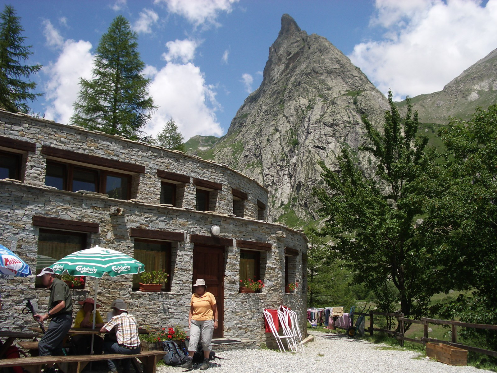 Acceglio, Maira Valley, Italy